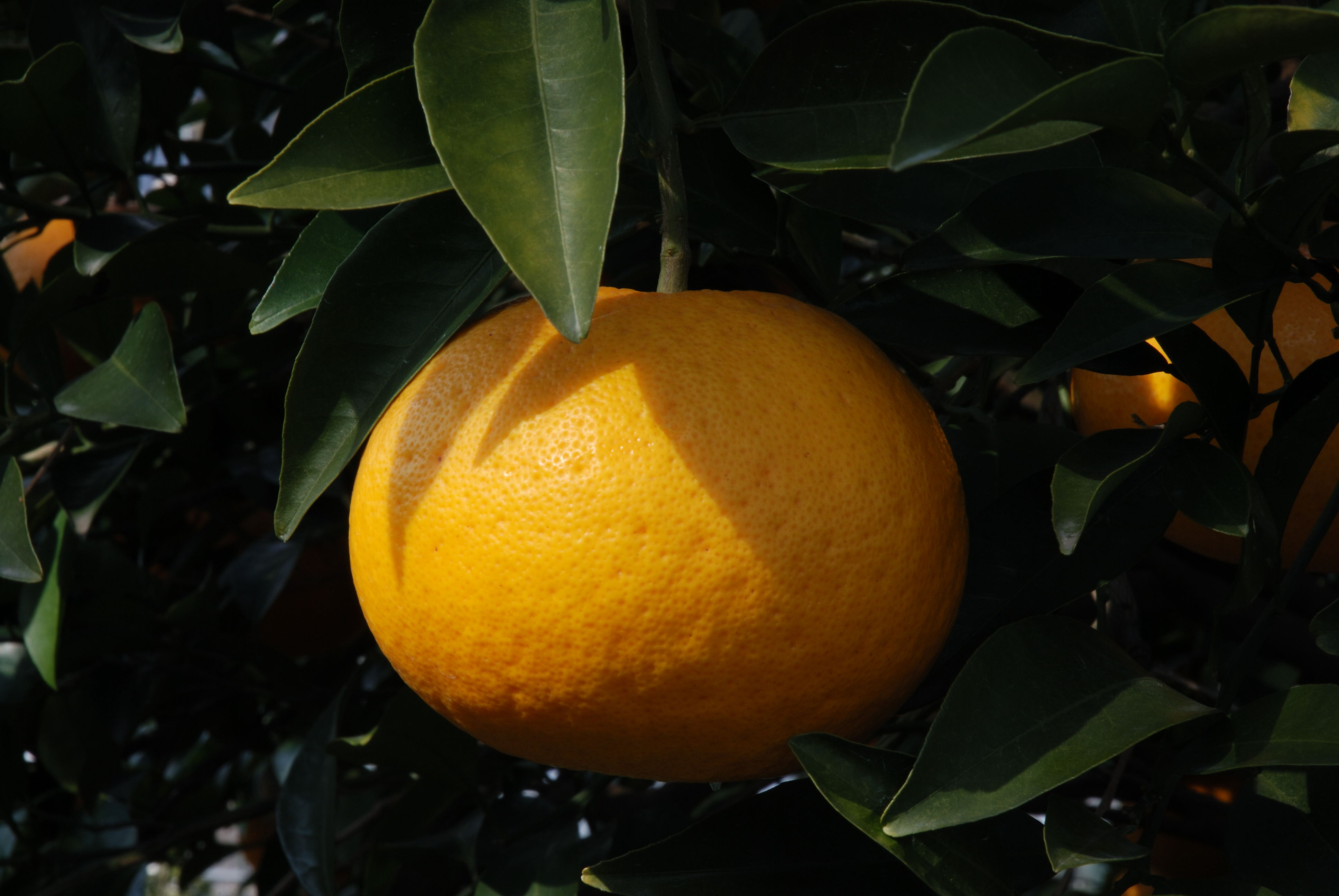 Kawanonatsudaidai (Amanatsu)